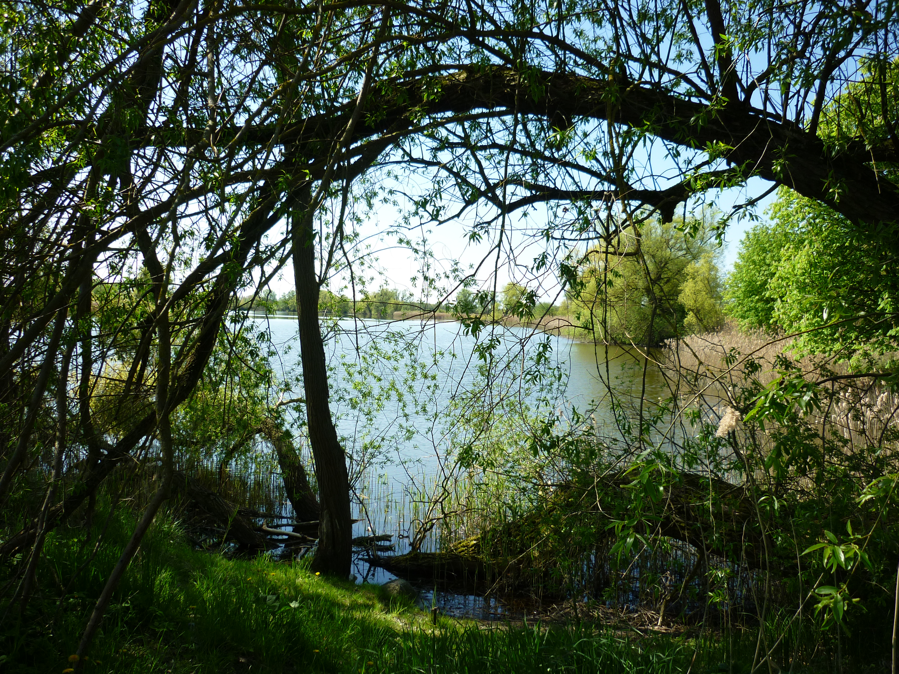 Der Lange Stich im Naturschutzgebiet "Biotopverbund Welsengraben" bei Gransee (Kreis Oberhavel).